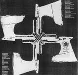 Laibach: Booklet der LP Opus dei